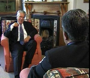 دیدد اوئن